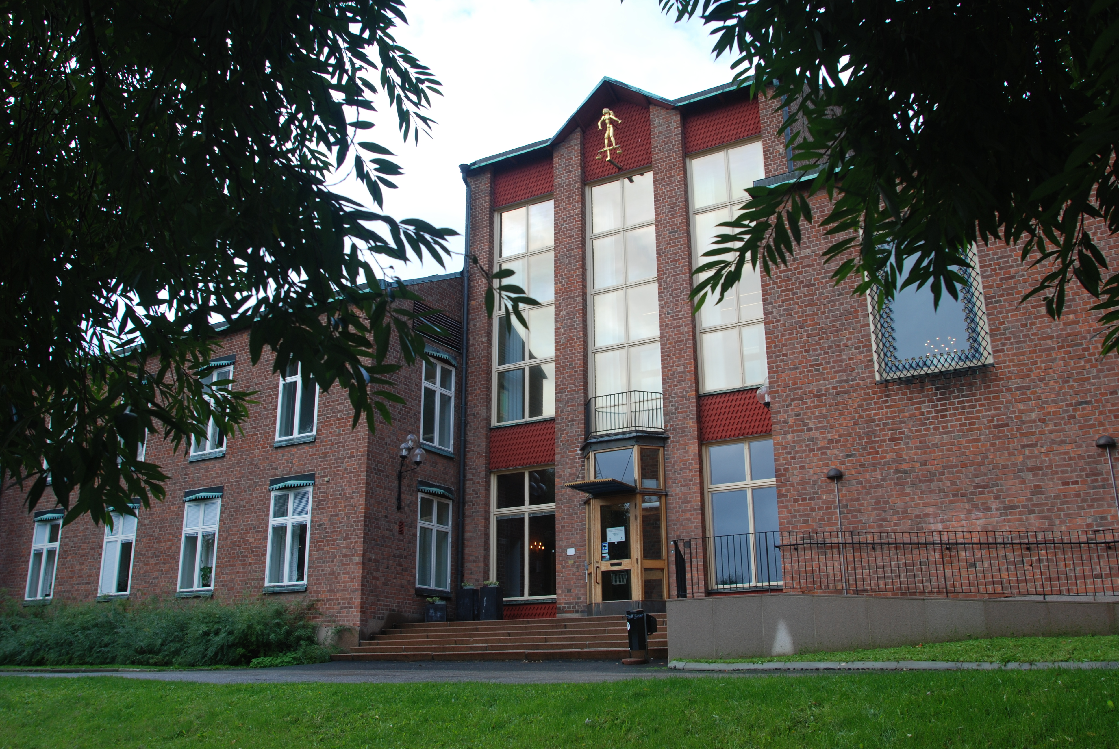 Hovrätten för nedre norrland som har fastighetsbeteckningen Hovrätten 2